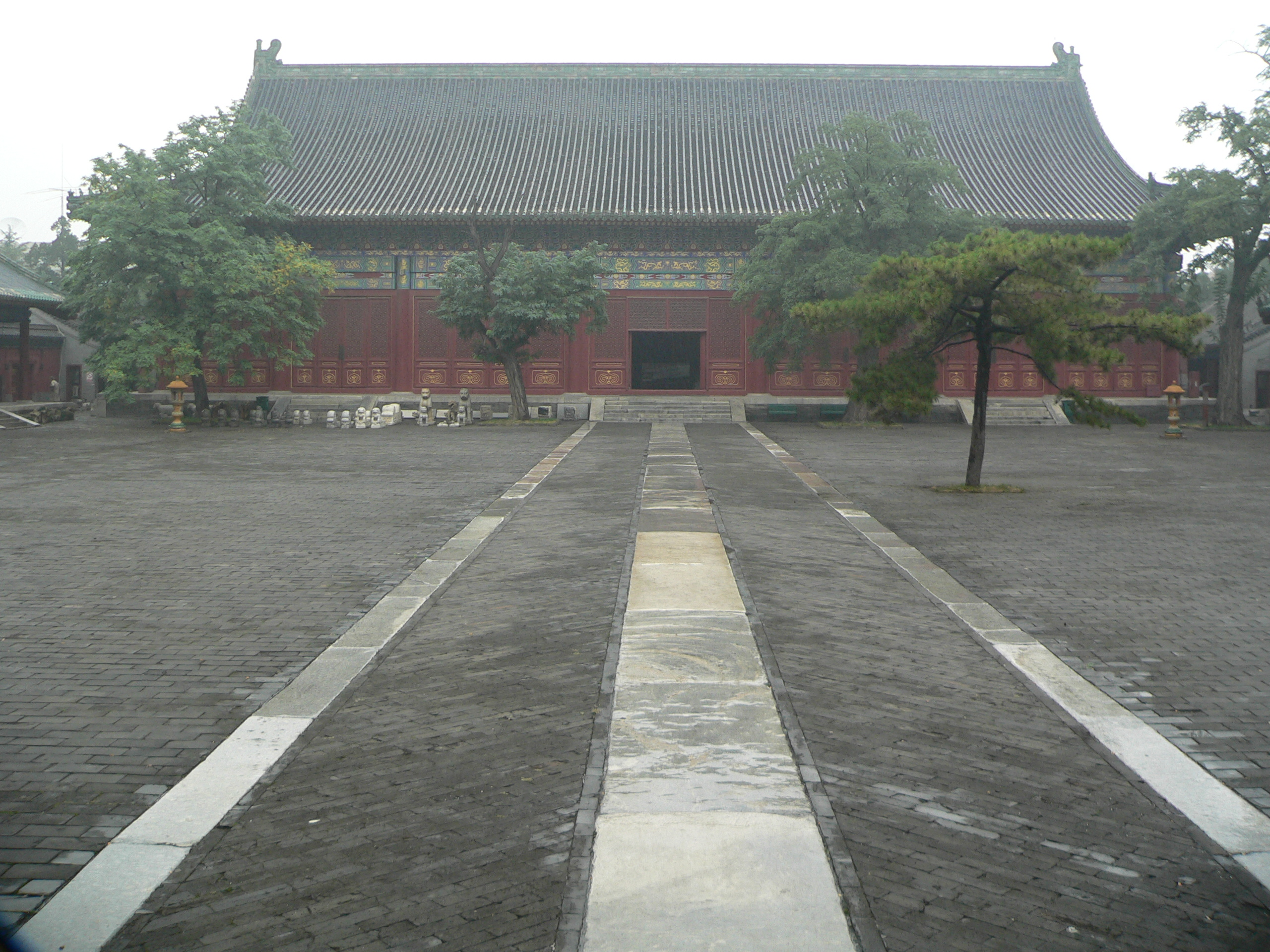 北京先农坛 太岁殿院中的拜殿 拍摄